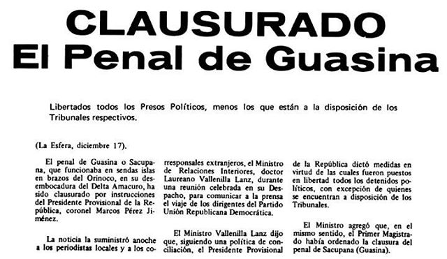 Artículo de prensa del Diario La Esfera, sobre la gestión de clausura del Centro Penitenciario de la Guasina por parte del recién instalado gobierno de Marcos Pérez Jiménez el 17 de diciembre de 1952.